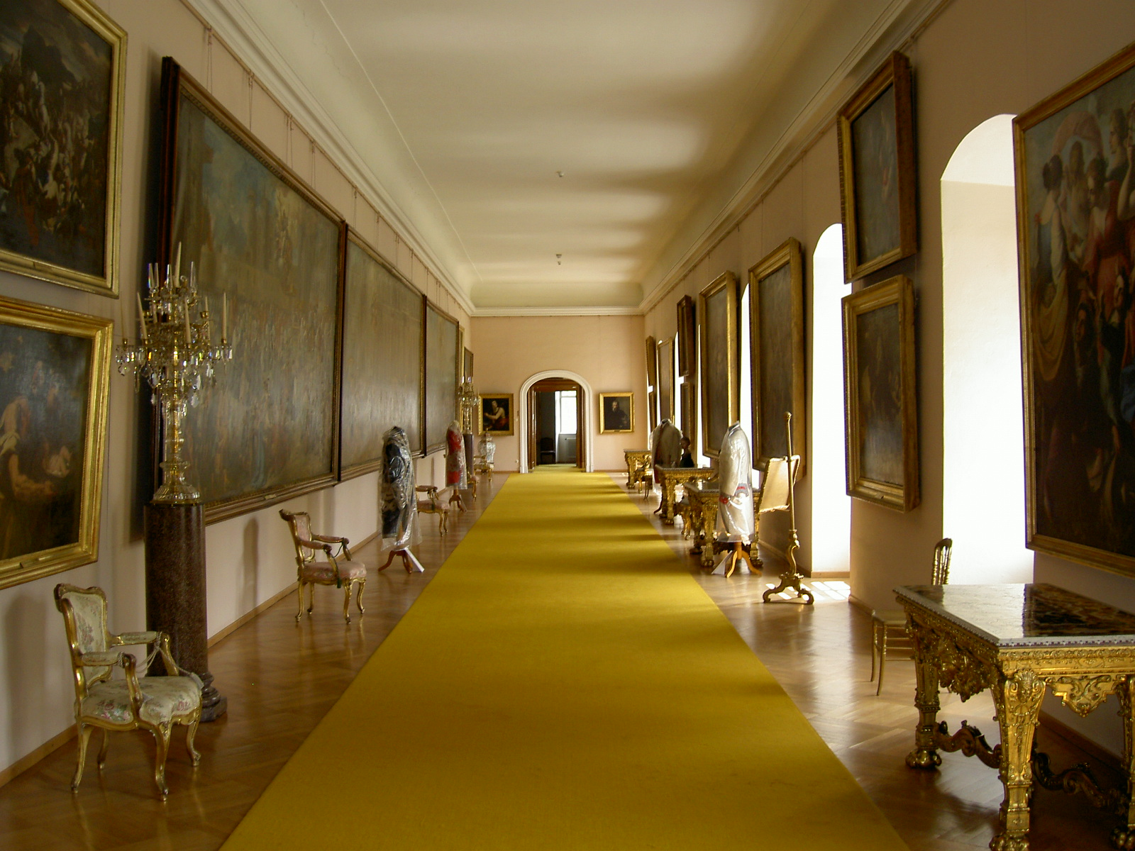 Blick in die Gemäldegalerie von Schloss Rohrau (Graf Harrach´sche Familiensammlung)